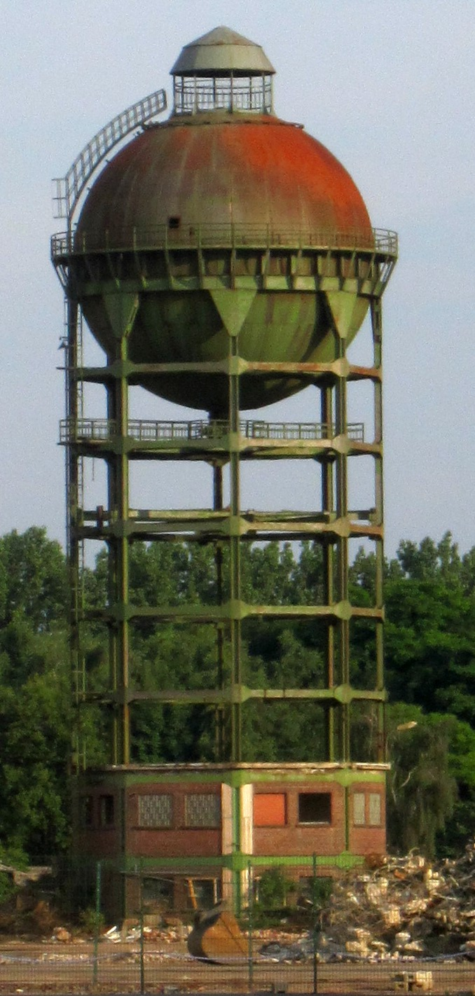 Wasser-Hochbehälter der Stahlwerke Bochum an der Castroper Strasse in Bochum. Nr. A 249 in der Denkmalliste der Stadt Bochum eingetragen.